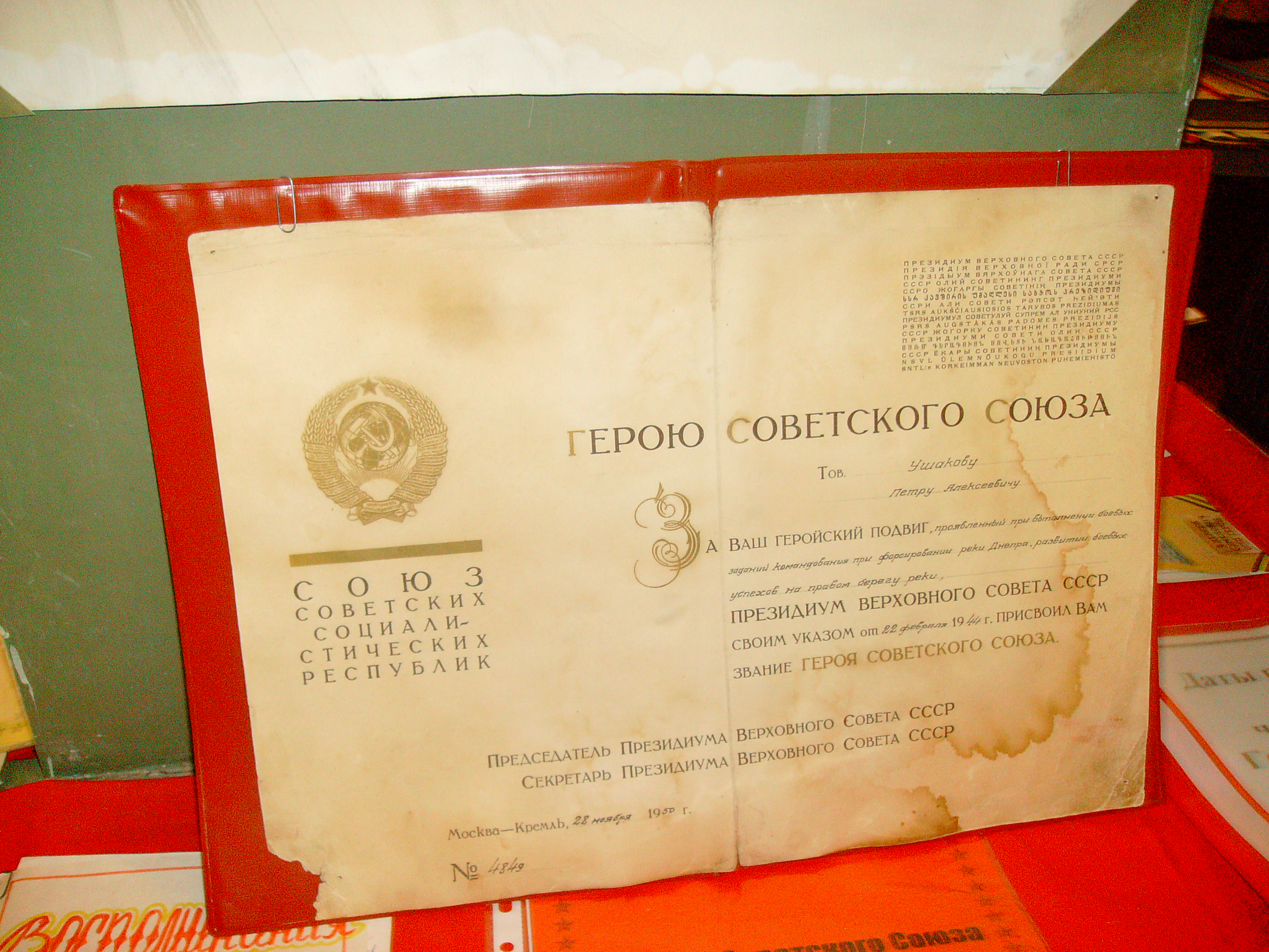 Башҡортса: П. А. Ушаков Башҡортостандың Стәрлетамаҡ районы Николаевка ауылында тыуған.